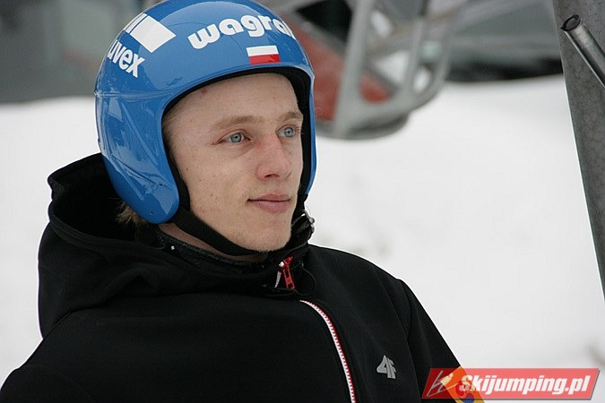 Dawid Kubacki podczas konkursu indywidualnego mężczyzn na skoczni normalnej w ramach Mistrzostw Świata 2013.